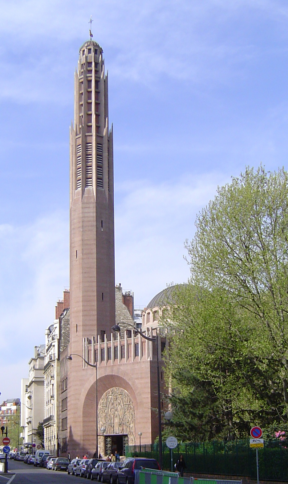 Photos prises à Paris